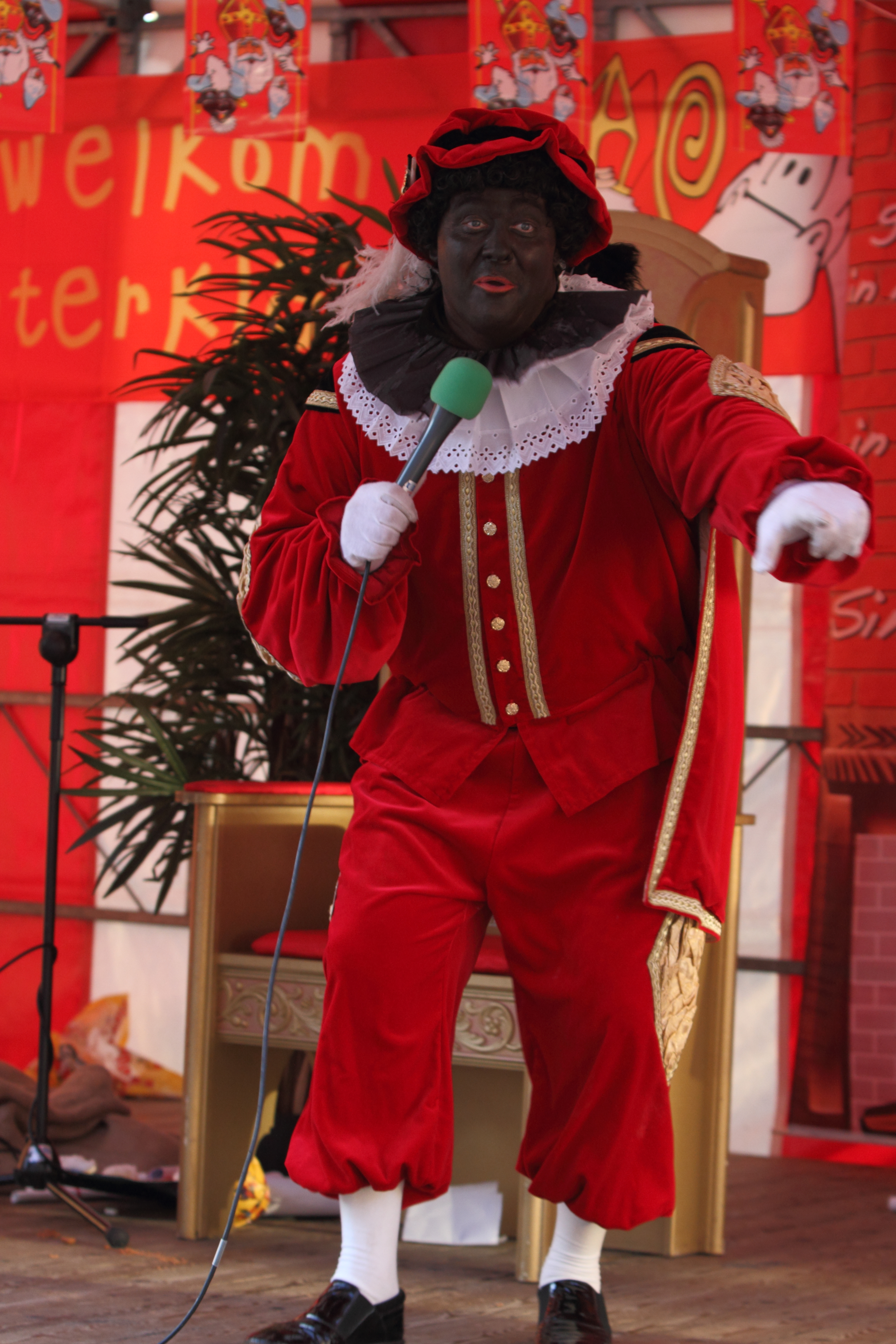 Sinterklaas in Ypenburg